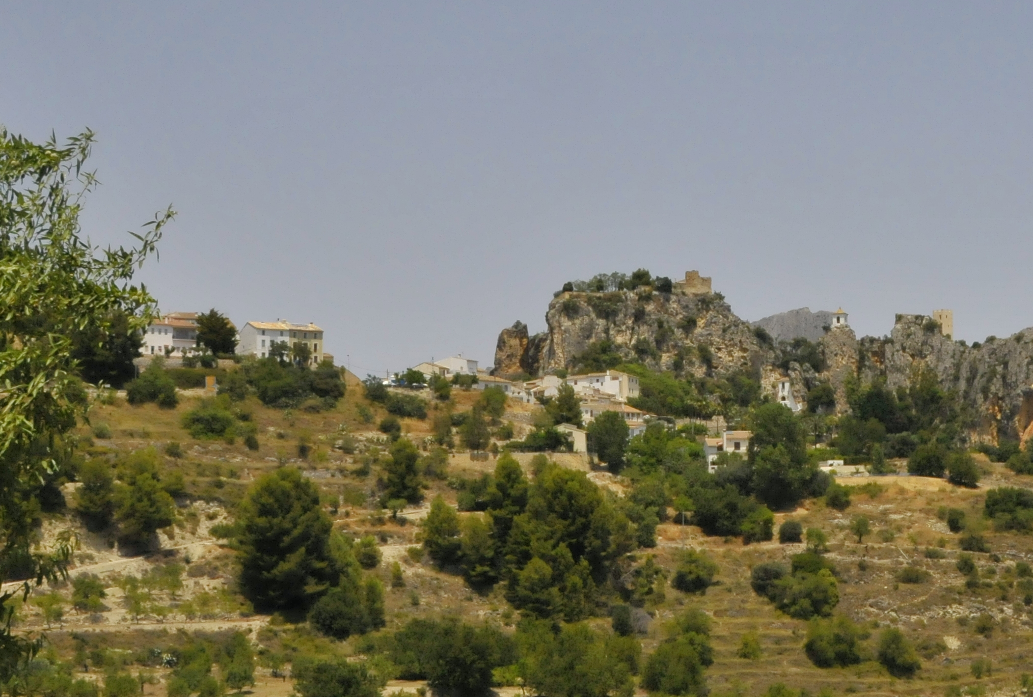 Guadalest von Süden